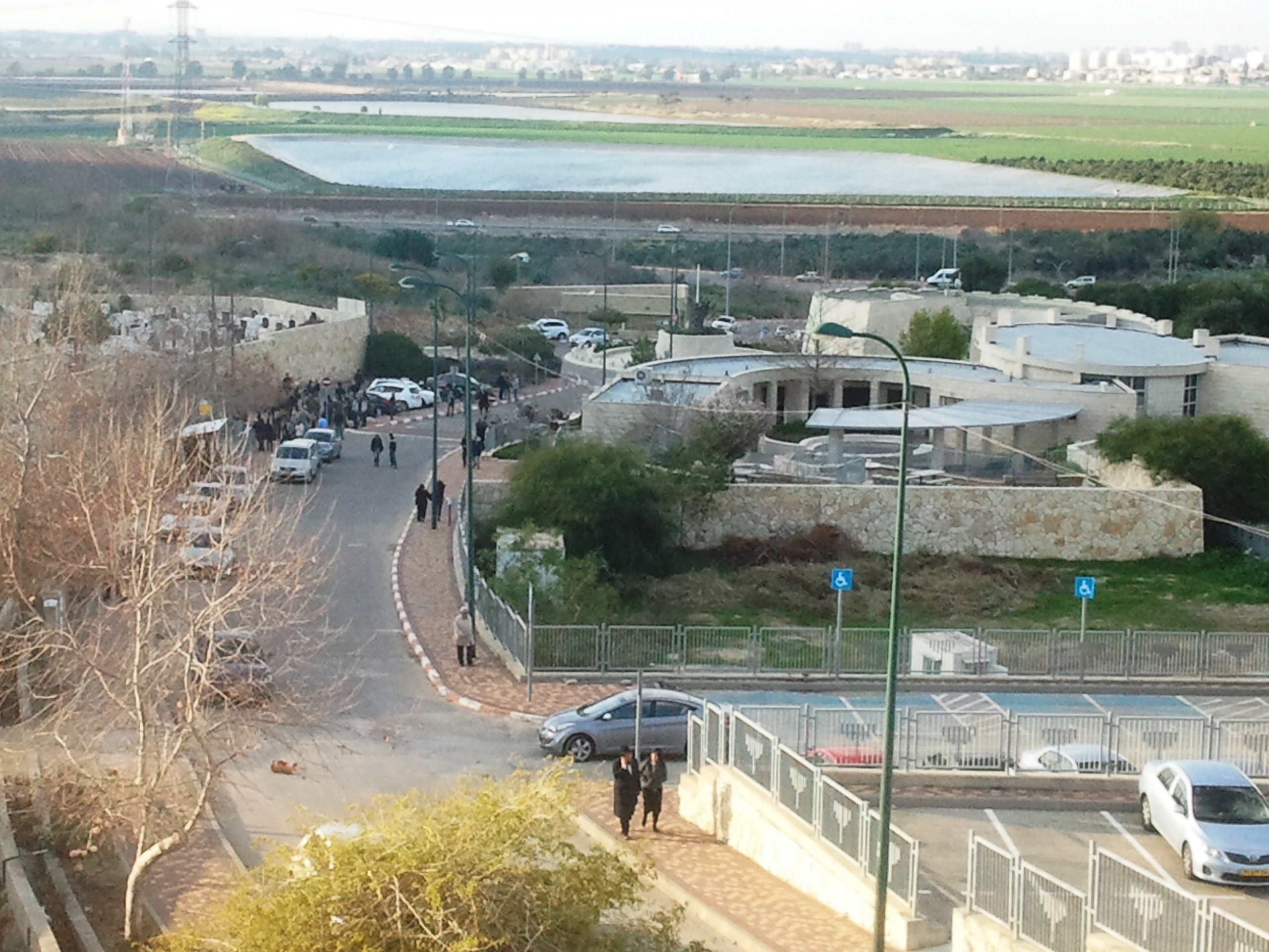 בית הקבות תל רגב שוכן ליד כביש 70 האמצע הדרך בין מחלף יגור למחלף סומך. הוא משרת את תושבי חיפה והקריות